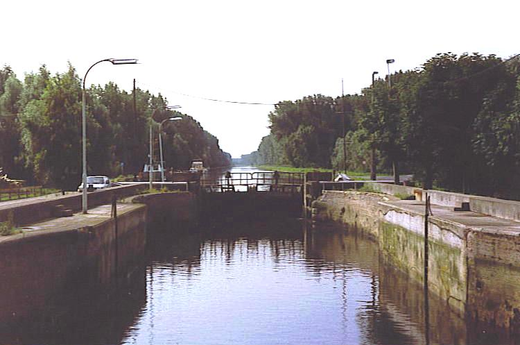 Schleis vun Zennegat - Kanal Louvain-Dijle.